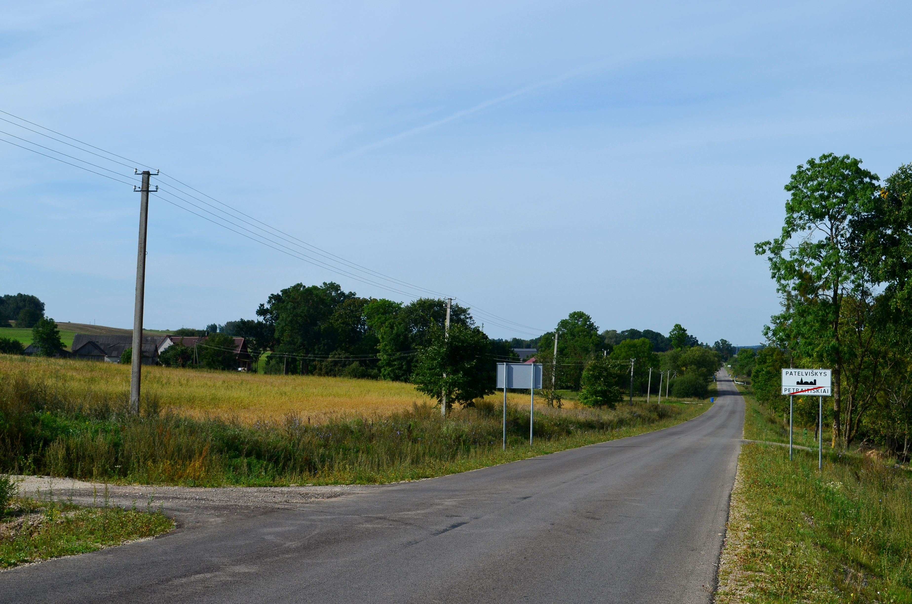 Patelviškys, Prienų raj.